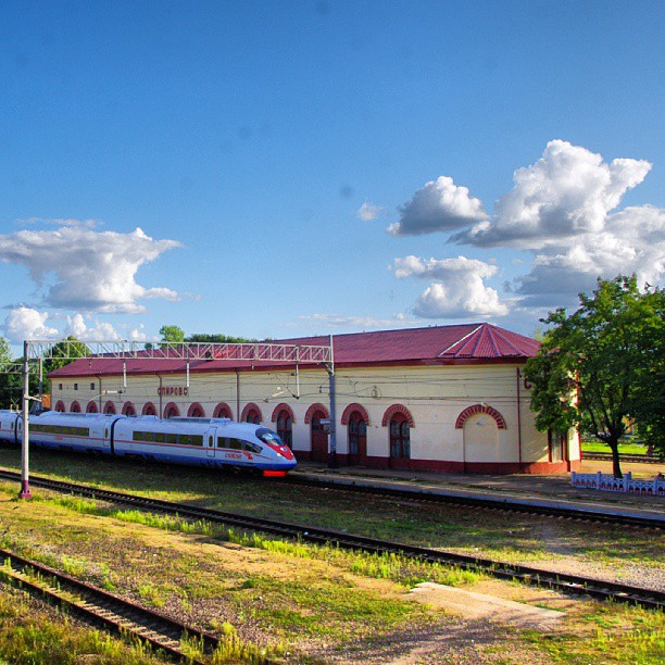 Электропоезд Сапсан на станции Спирово